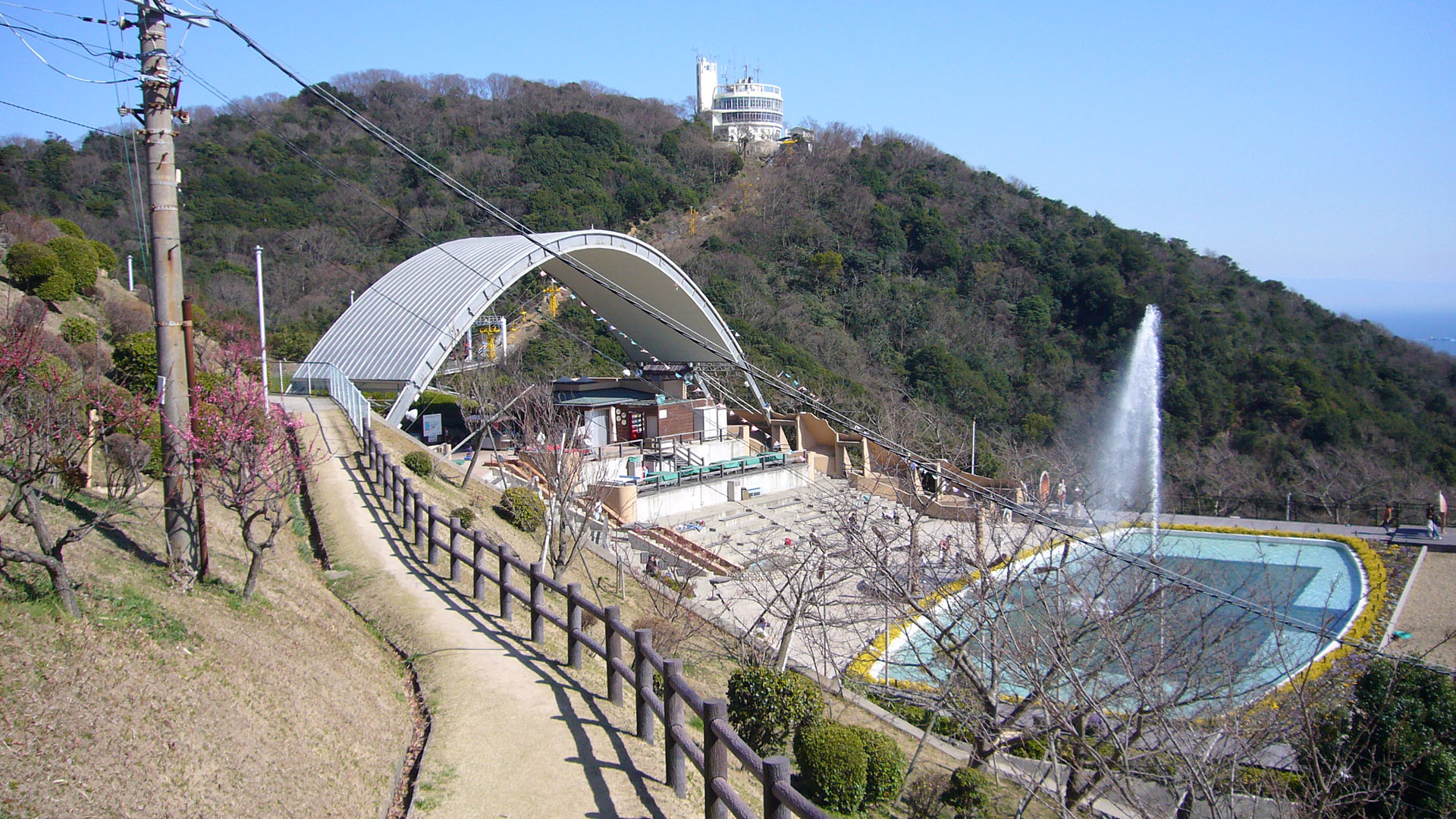 Sumaura Sanjo Amusement Park in Kobe, Japan